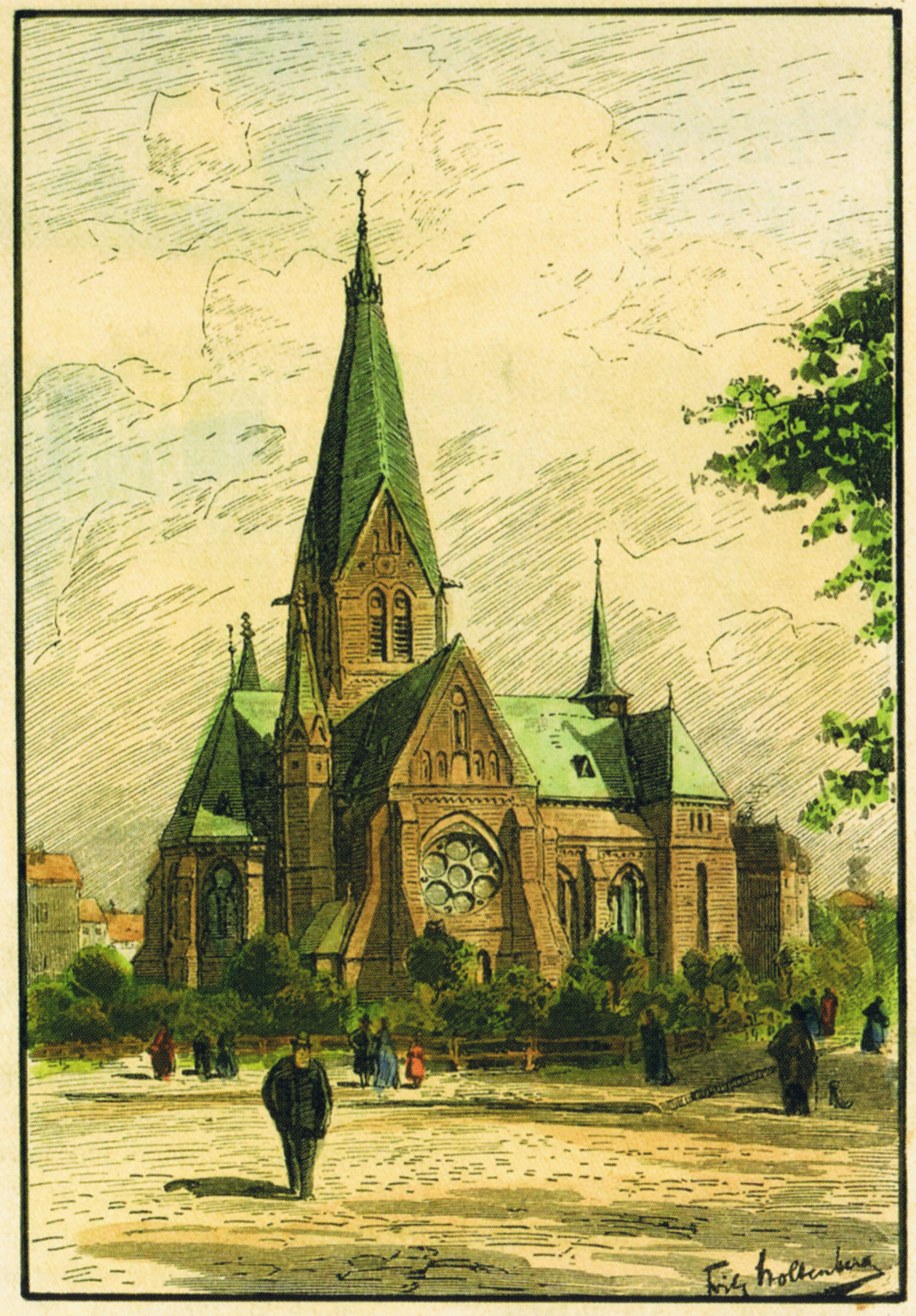 Die Jacobikirche in Kiel, Holzstich von Fritz Stoltenberg (nachträglich koloriert)